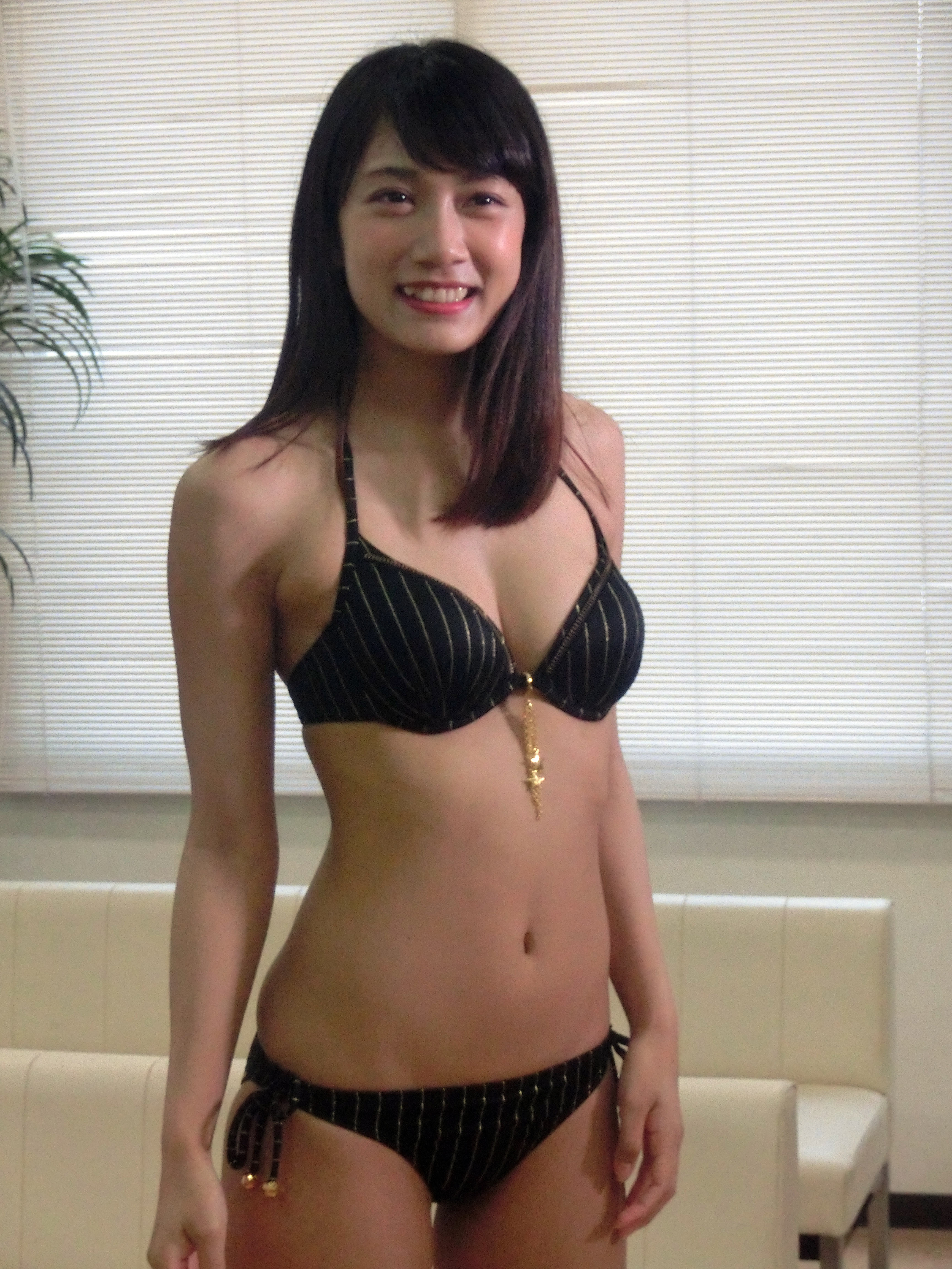 Yuki Ishihara